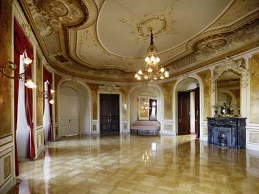 Der Spiegelsaal des Opernhauses Zürich